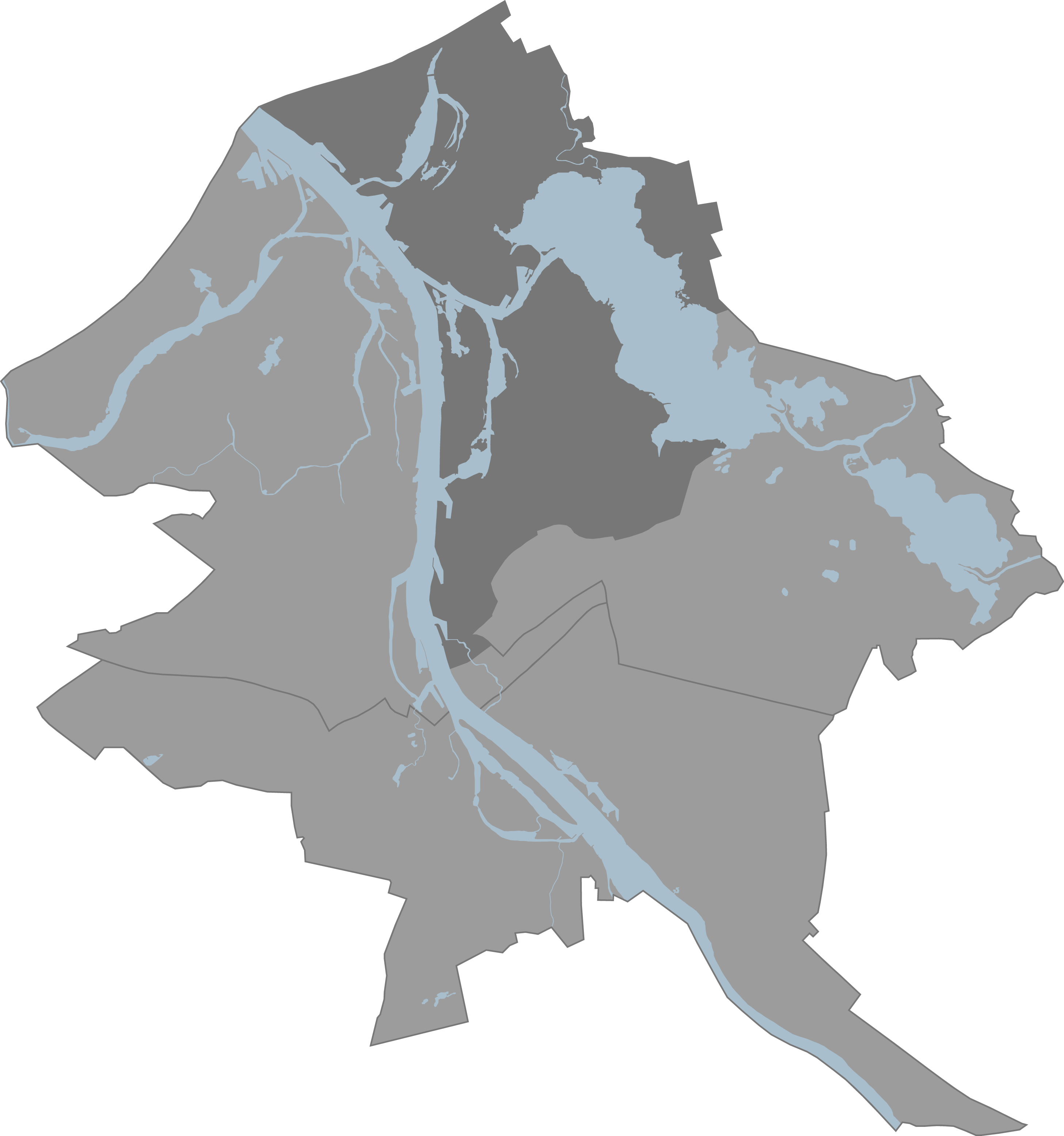 Riga Ziemelu rajons karte